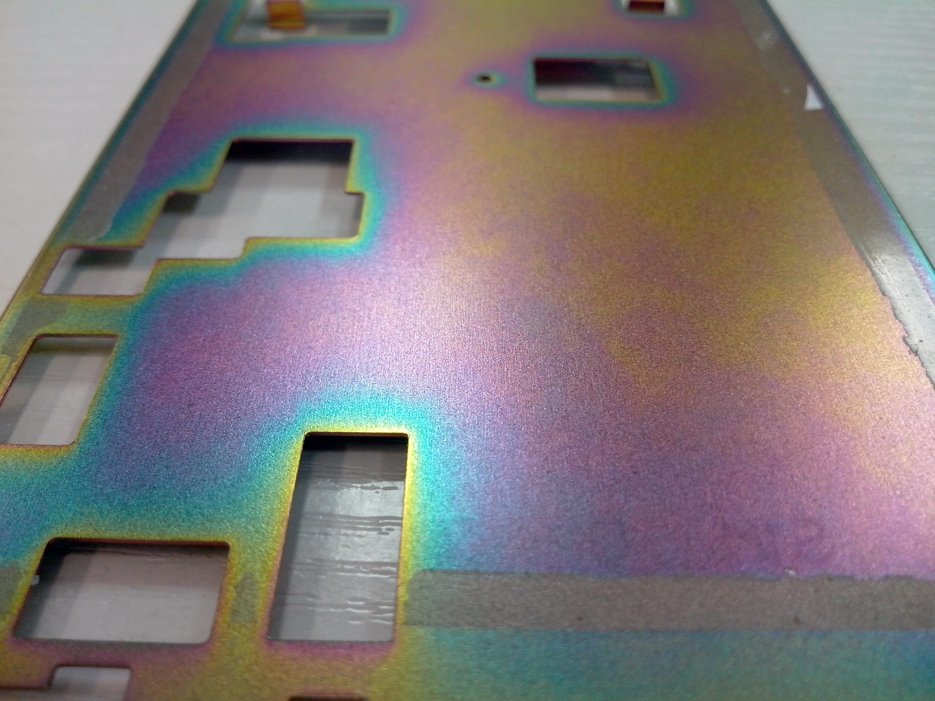 Macro de la pièce